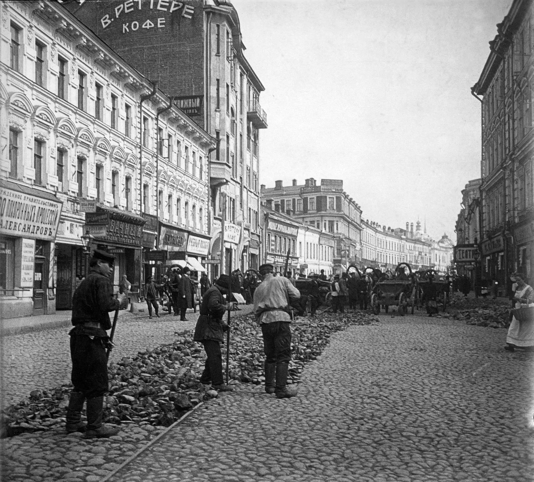 Замена путей конки на электрический трамвай на Арбате, 1908 год.